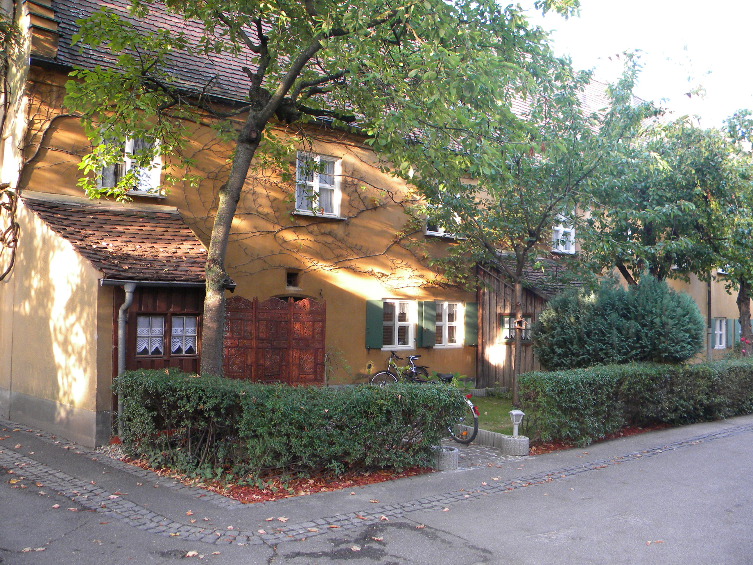 Дом в Фуггерай